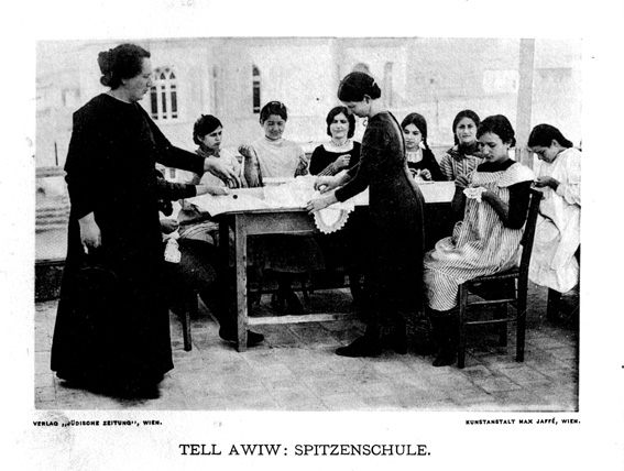 שרה טהון האישה היחידה שכיהנה כחברה מן המניין ב"ועד הזמני של יהודי ארץ-ישראל" פעילה פמיניסטית וחברתית שפעלה לקידום נשים בתמונה היא מלמדת איך רוקמים את בנות היישוב היהודי